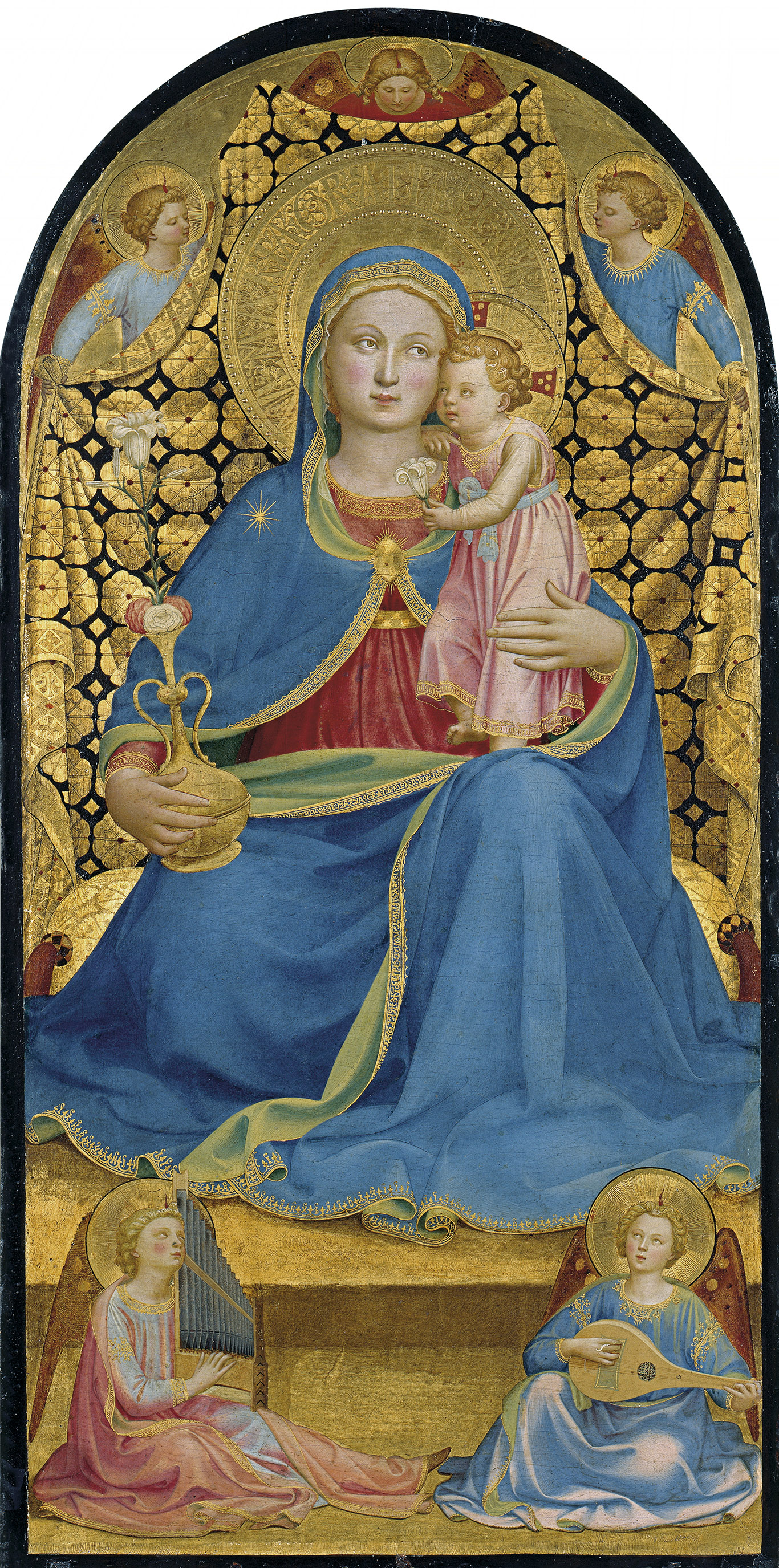 Virgen de la Humildad ANGELICO, Fra The Virgin of Humility Tempera on panel, 99 x 49 cm Fundación Colección Thyssen-Bornemisza, Pedralbes